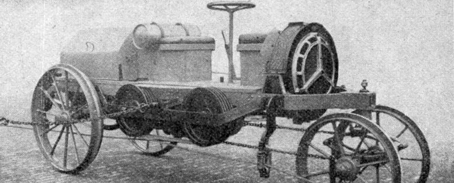 Tracteur agricole à pétrole Daimler, de février 1912 (exposition agricole de Paris).